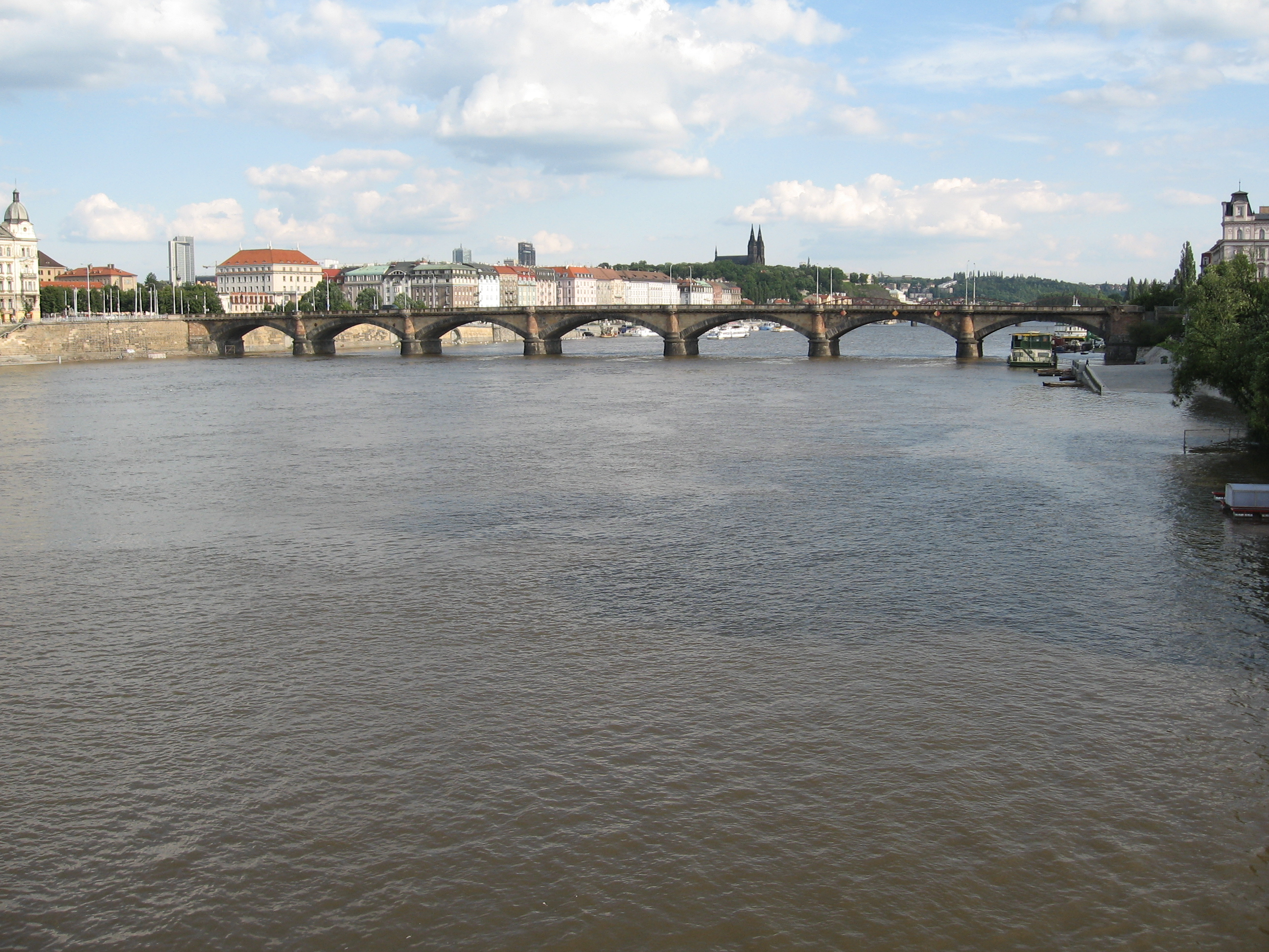 Palackého most, Praha, Czechia